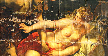 "Тарквиний и Лукреция", поврежденное полотно Рубенса